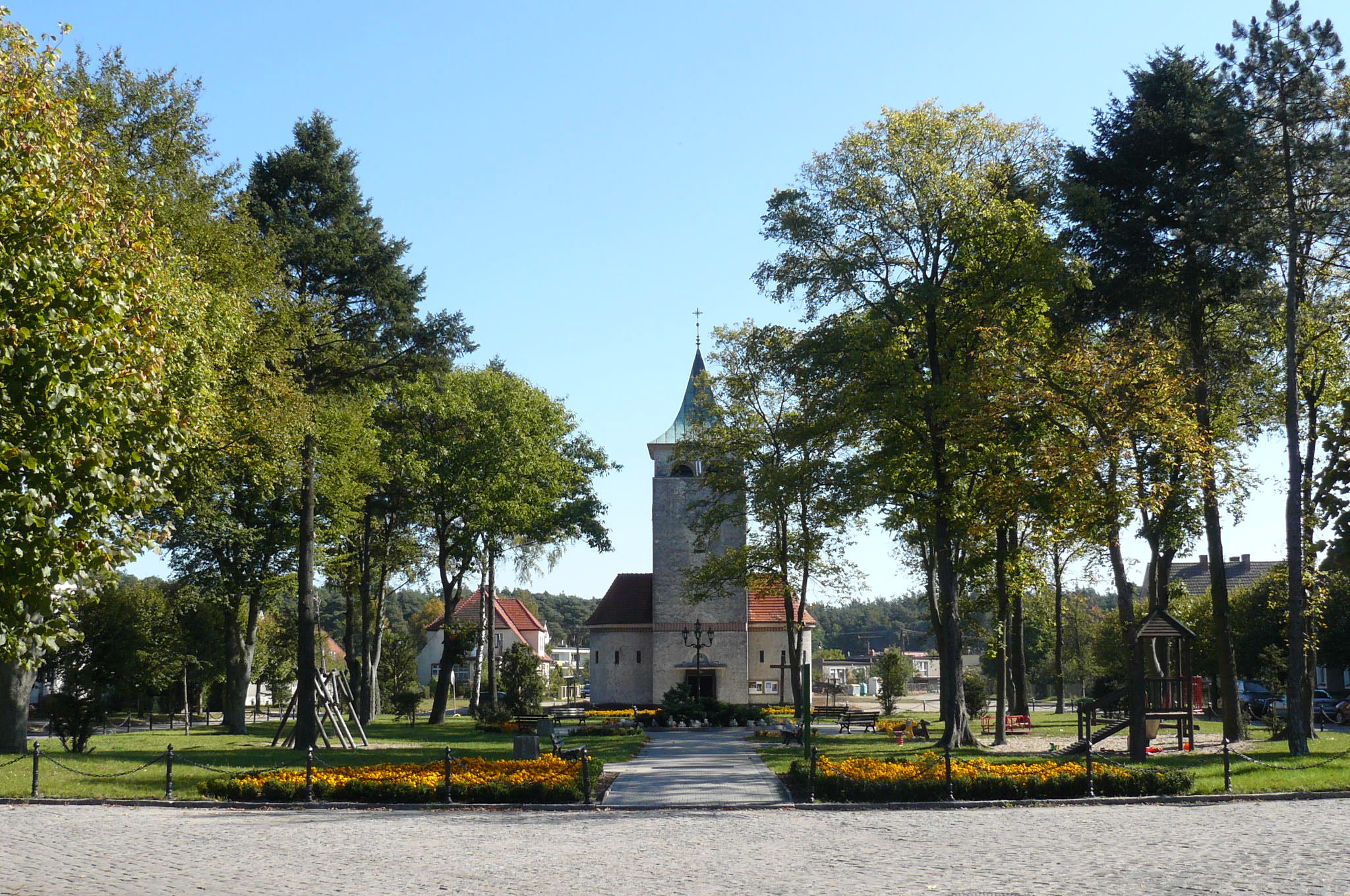 Wieleń Północny - church.